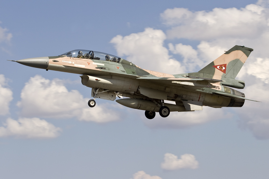 Take-off F-16B Venezuela